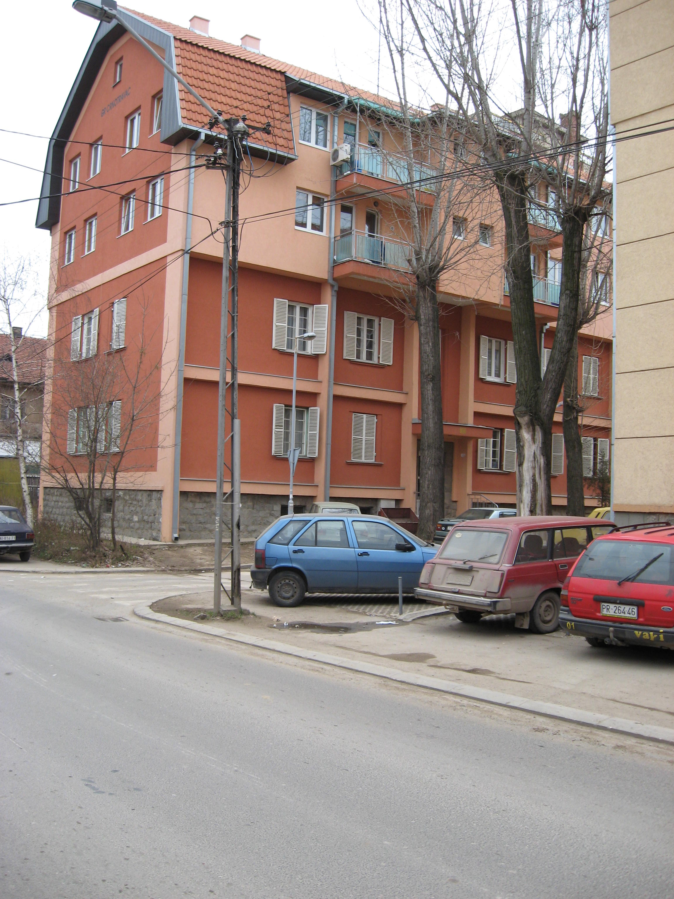 Драган Цветковић Ниш Сопствена слика